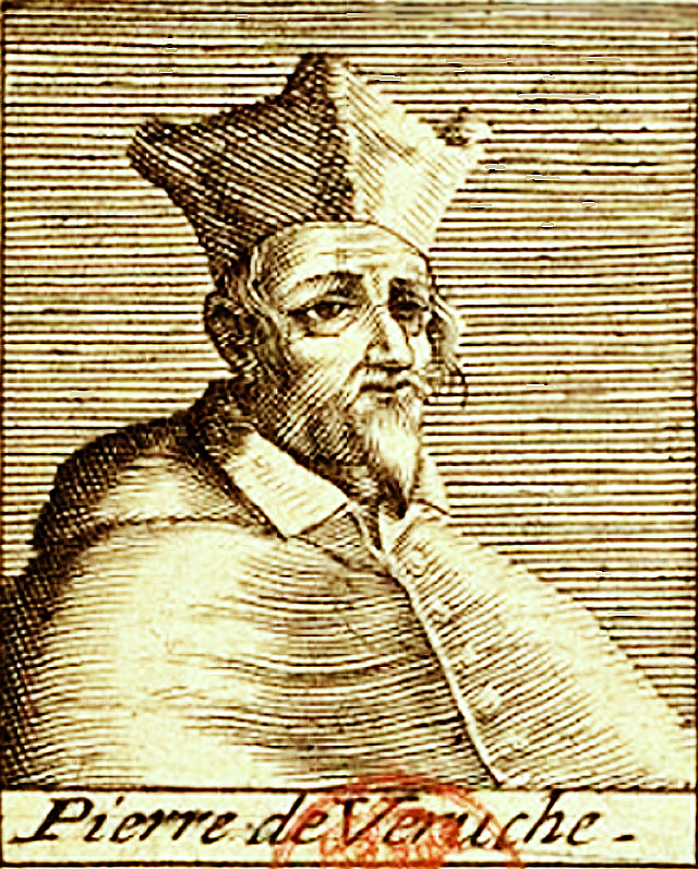 Cardinal Pierre de la Vergne